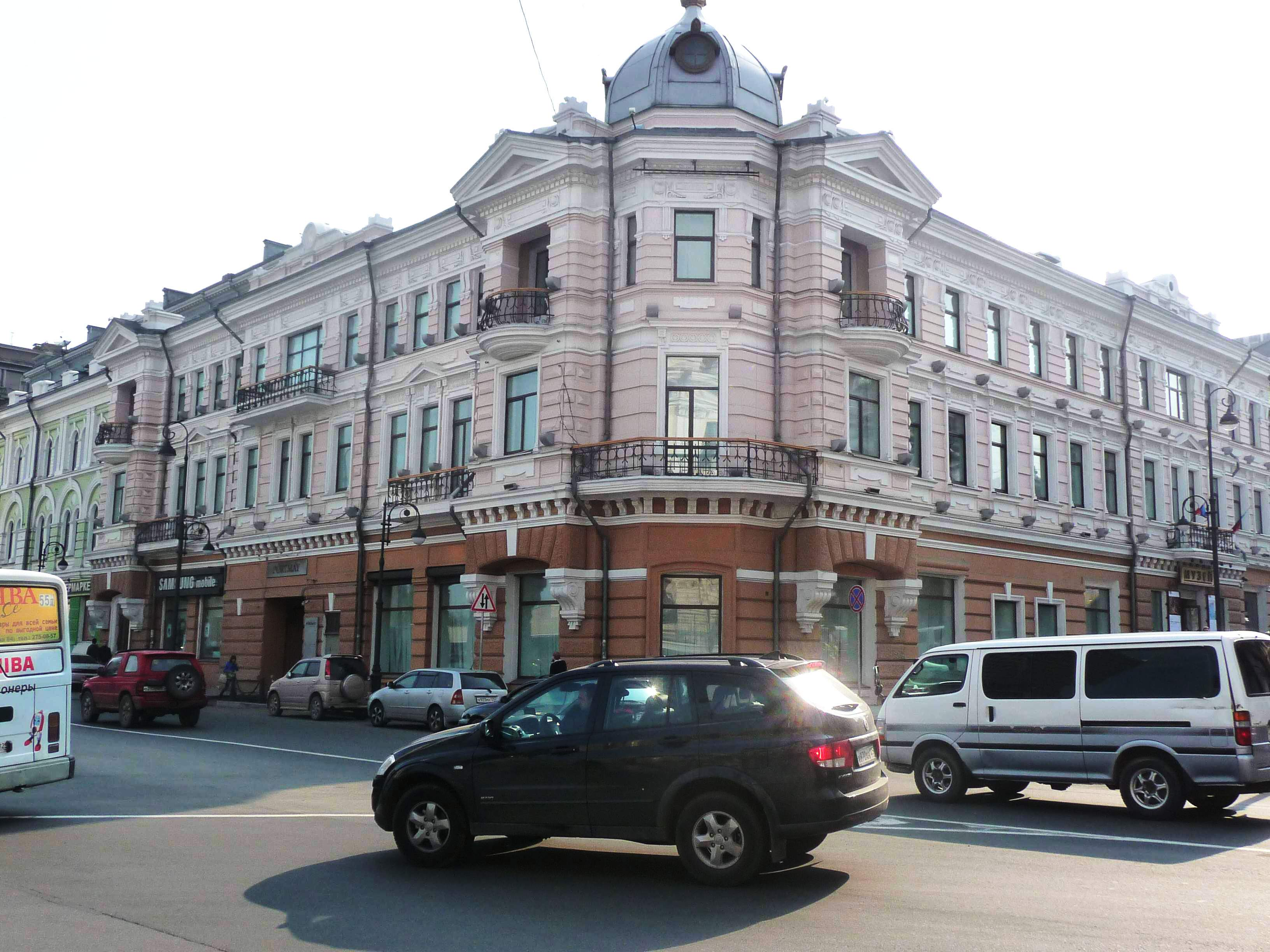 Владивосток, перекрёсток Светланской и Алеутской, 2012-06-14